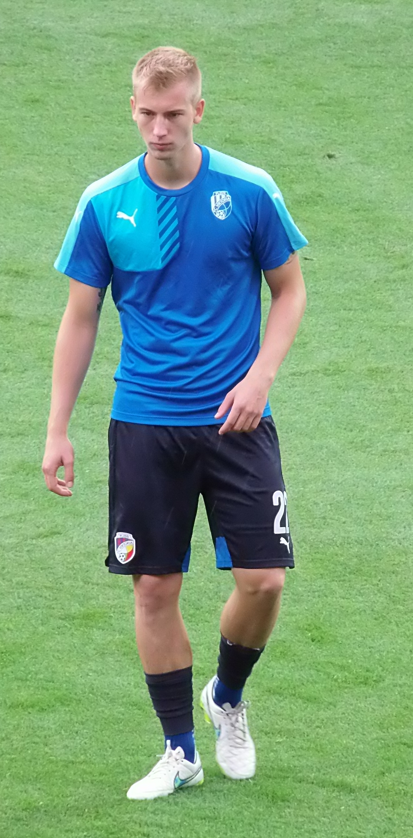 Jan Baránek na tréninku před českým Superpohárem 2015